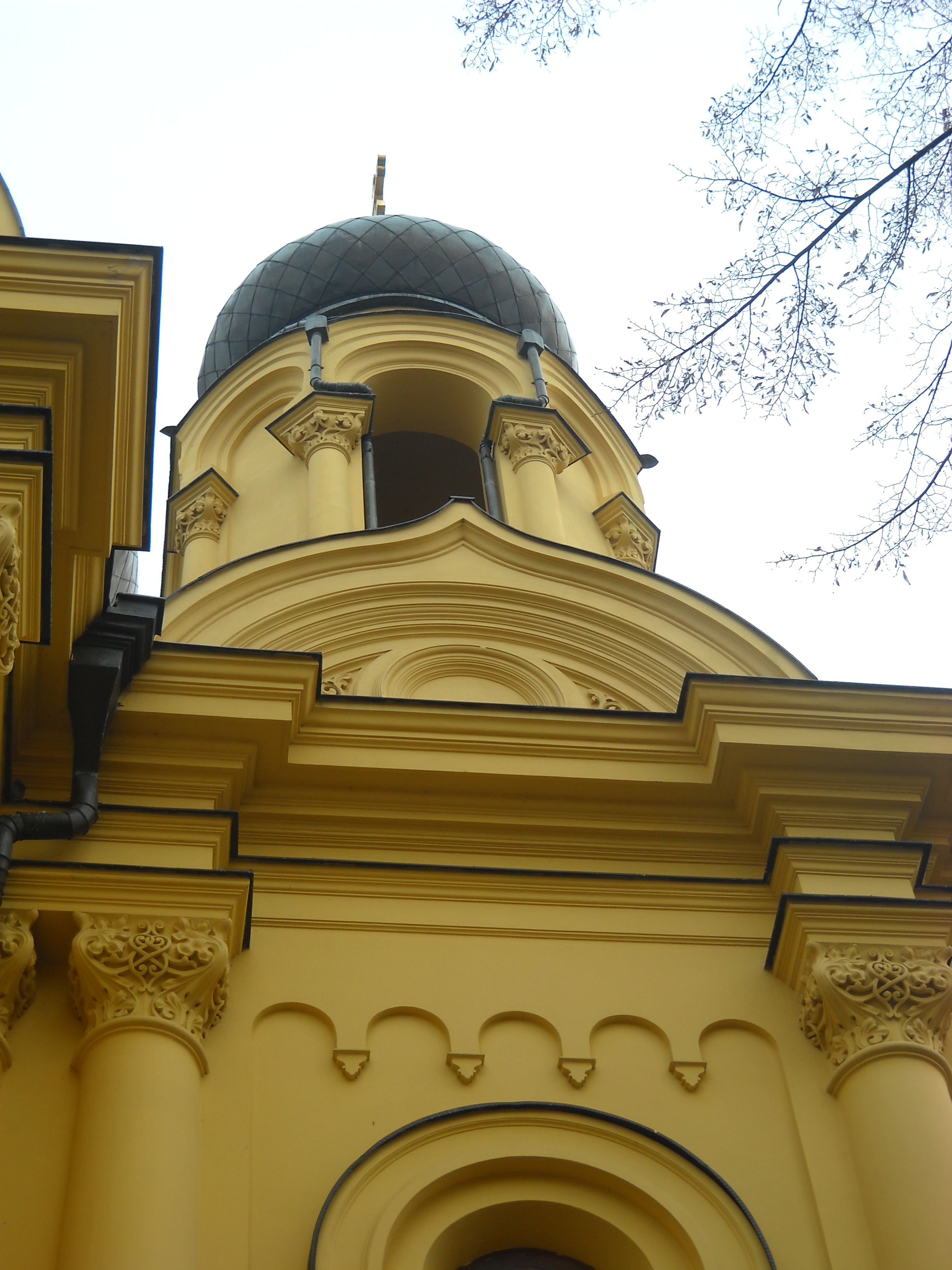 Jedna z bocznych kopuł soboru w Warszawie